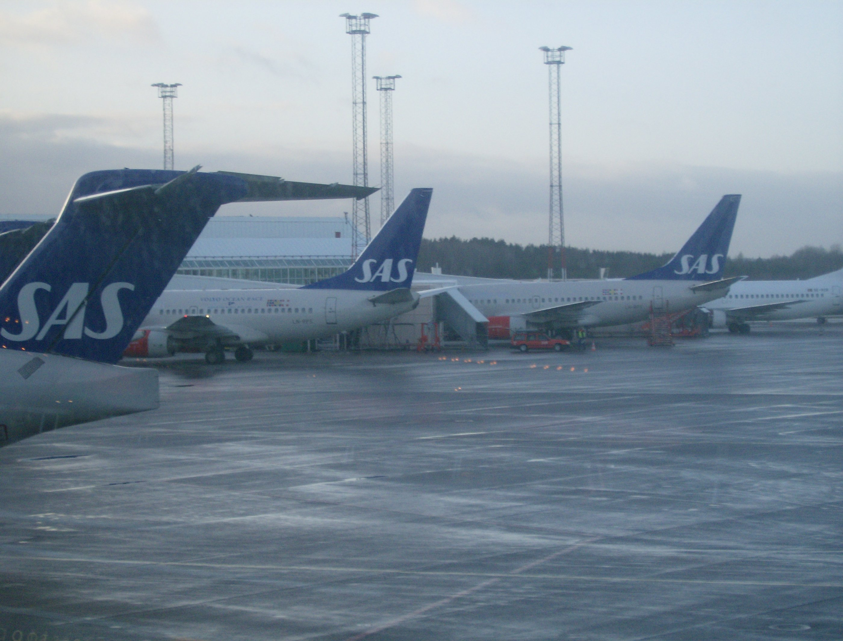 Terminalul 4, Arlanda Internațional, Stockholm, Suedia. Cozile a trei avioane SAS vizibile - două avioane 737, și un avion McDonnell Douglas MD-80, pentru curse interne.